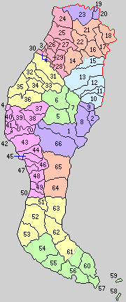 愛知県知多郡の町村制時点の町村。